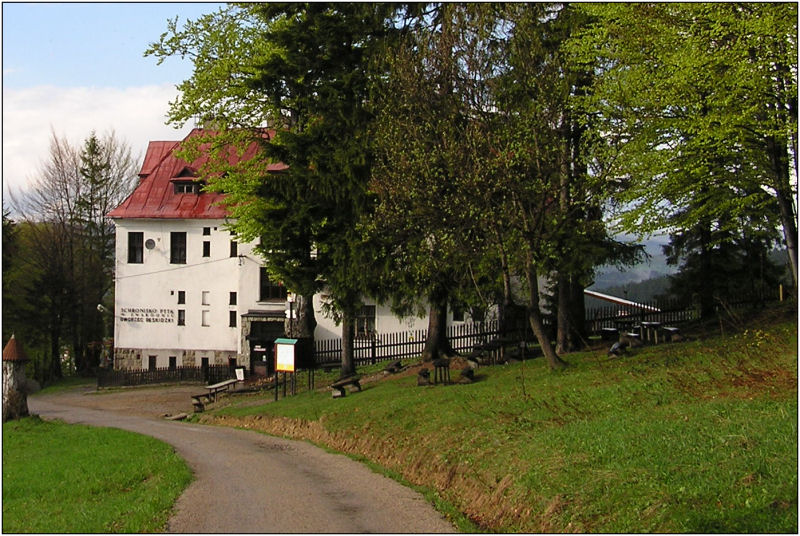 Zwardoń - Schronisko Dworzec Beskidzki, maj 2004 r. Fotografia udostępniona przez Giraff camelopardalis 18:32, 9 kwi 2005 (CEST) na bazie licencji GNU FDL.